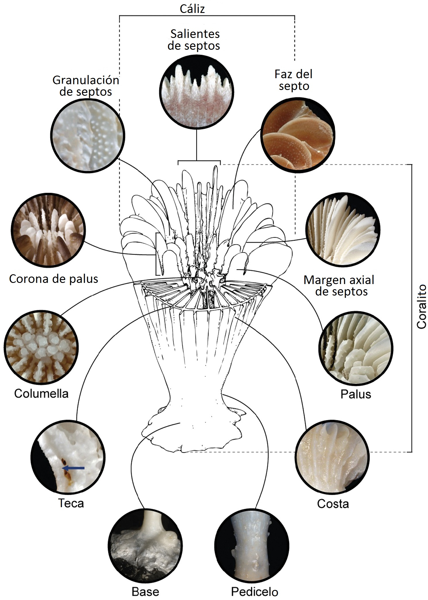 Traducción de diagrama Estructura de coralito de archivo Commons